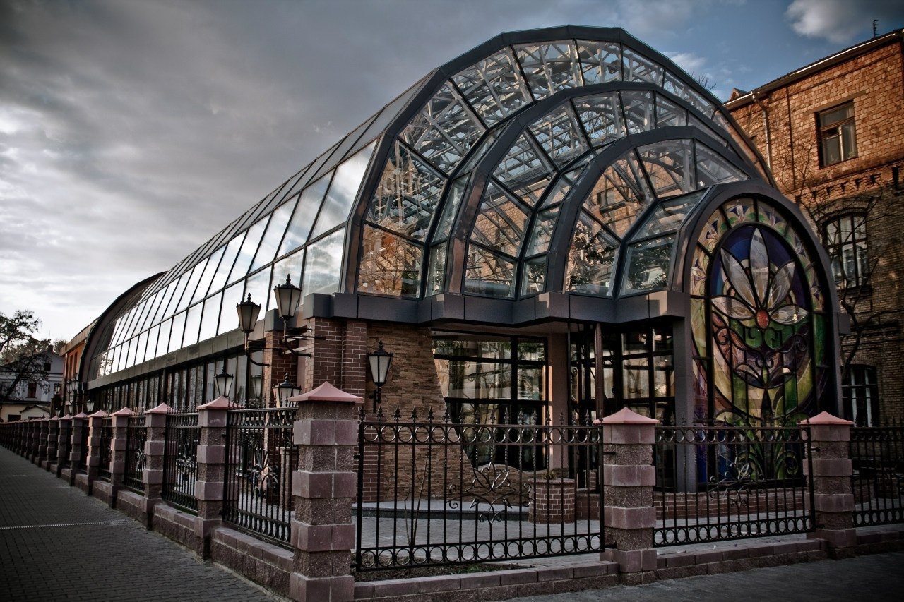 Зимний сад